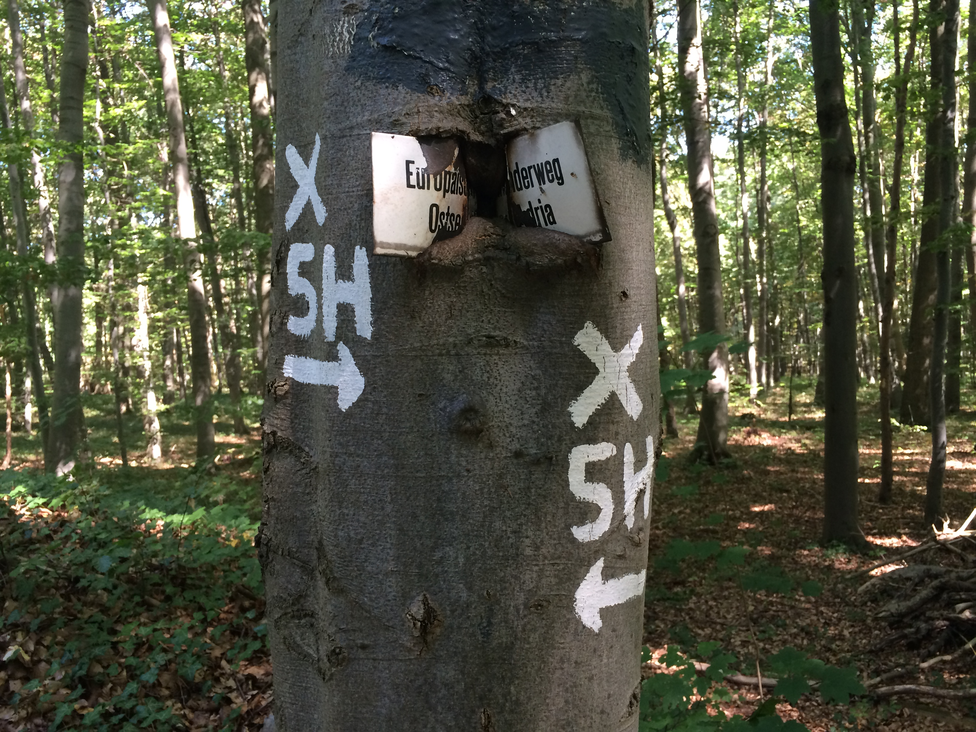 Wegzeichen des Europäischen Fernwanderweges E6 und des Werra-Burgen-Steiges Hessen (X5H) am Manrod